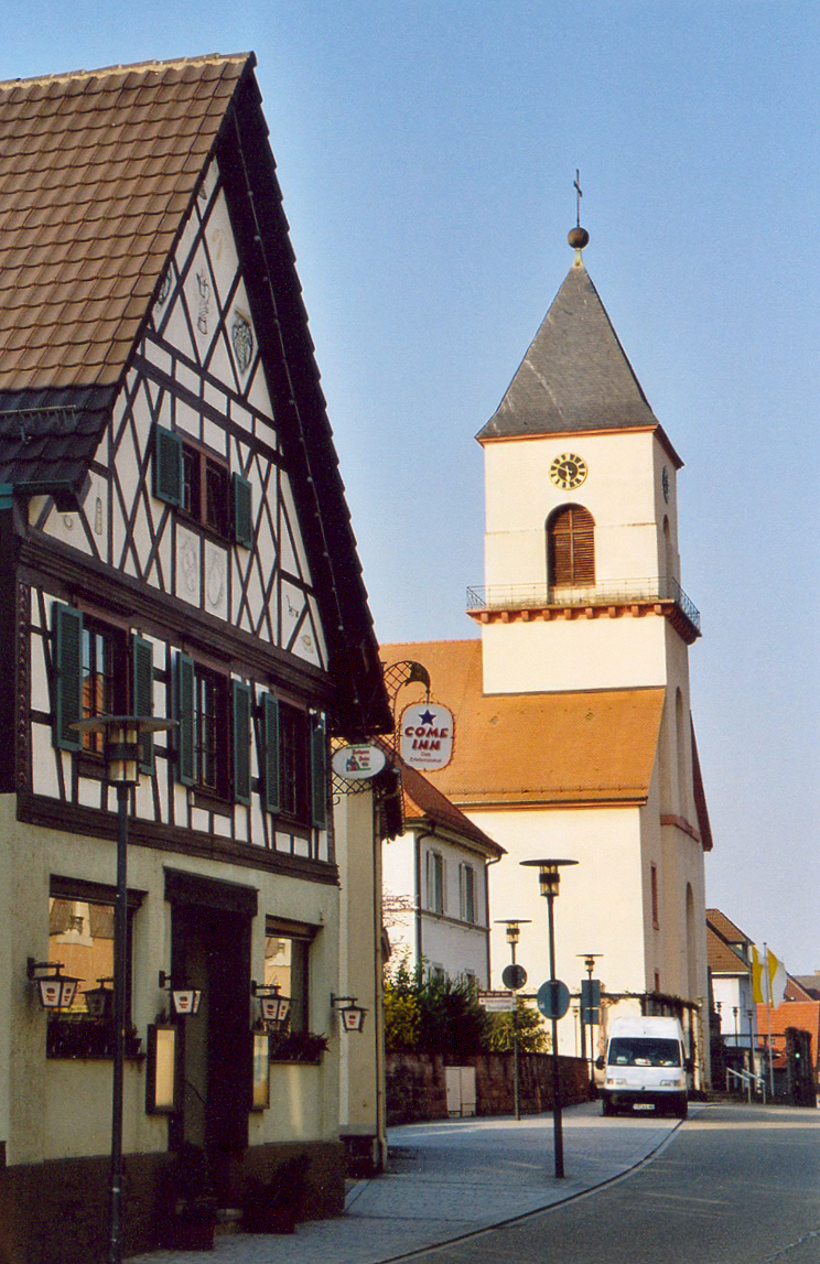 Die Kirche Renchens, erbaut 1817 nach Entwurf Friedrich Weinbrenners